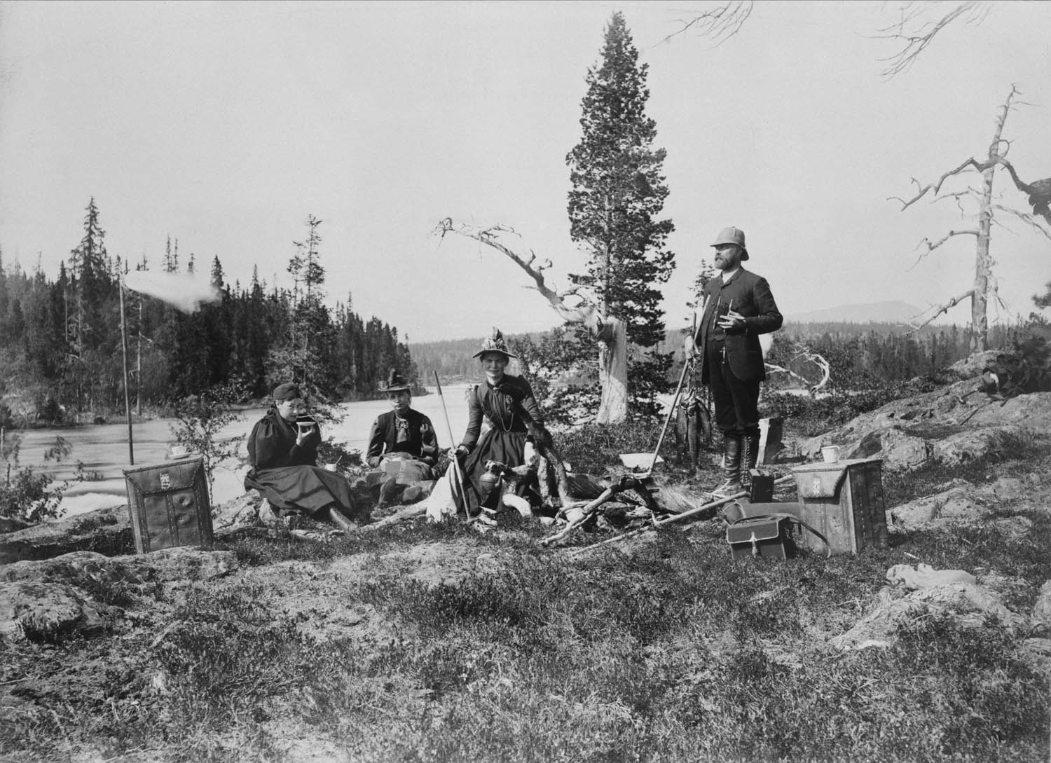 "Rast vid forshuvudet ovanför Bieliteforsen under en färd 1895 till vårhelgen i Fatmomakke.Från vänster: Ada Danielsson, Berta Zetterberg, Erika Ingberg samt kyrkoherde Lars Dahlstedt, den sistnämnde skrudad i höga stövlar och tropikhjälm."